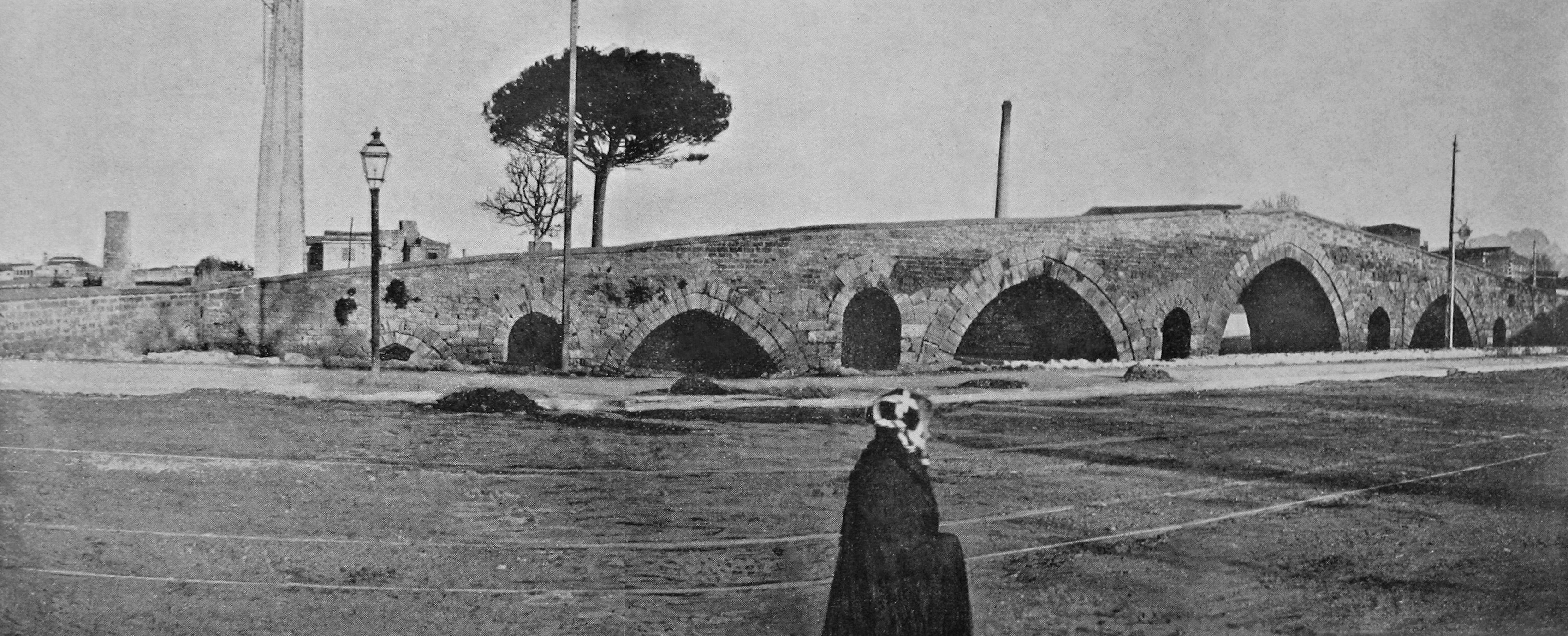 Ponte dell'Ammiraglio intorno al 1910.